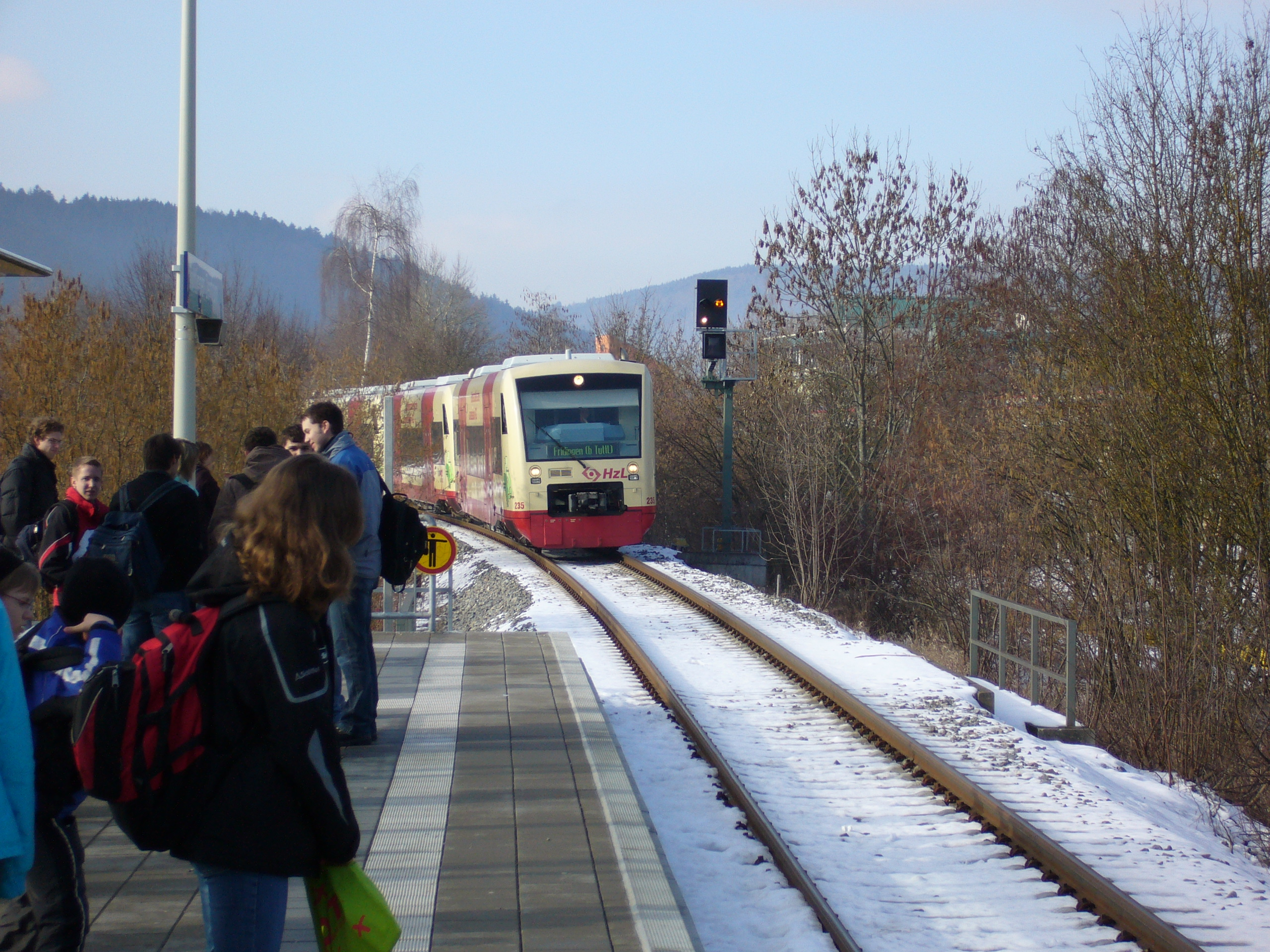 Ringzug am Haltepunkt Tuttlingen Zentrum